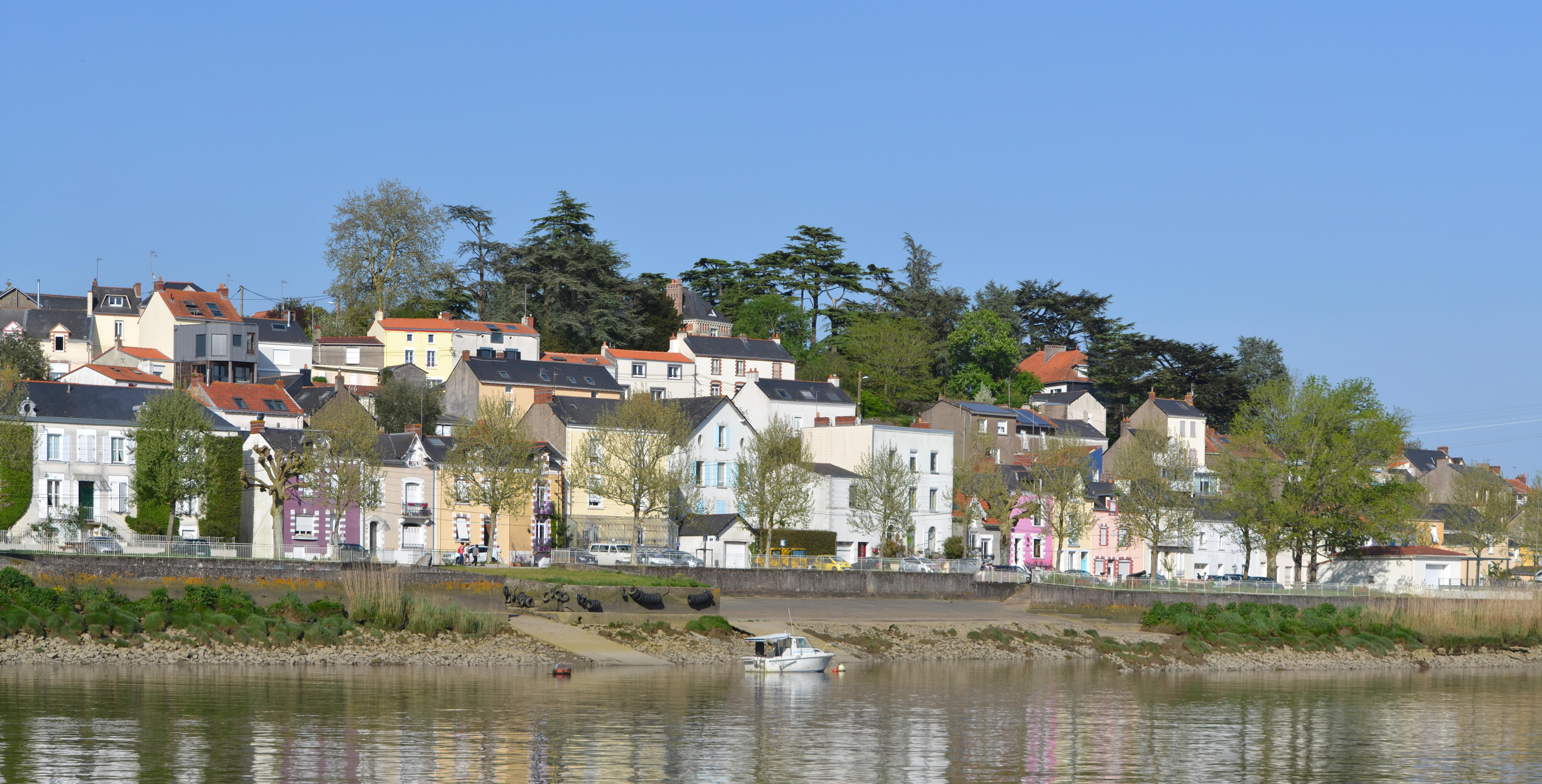 Indre. Panorama du bourg depuis la Loire.